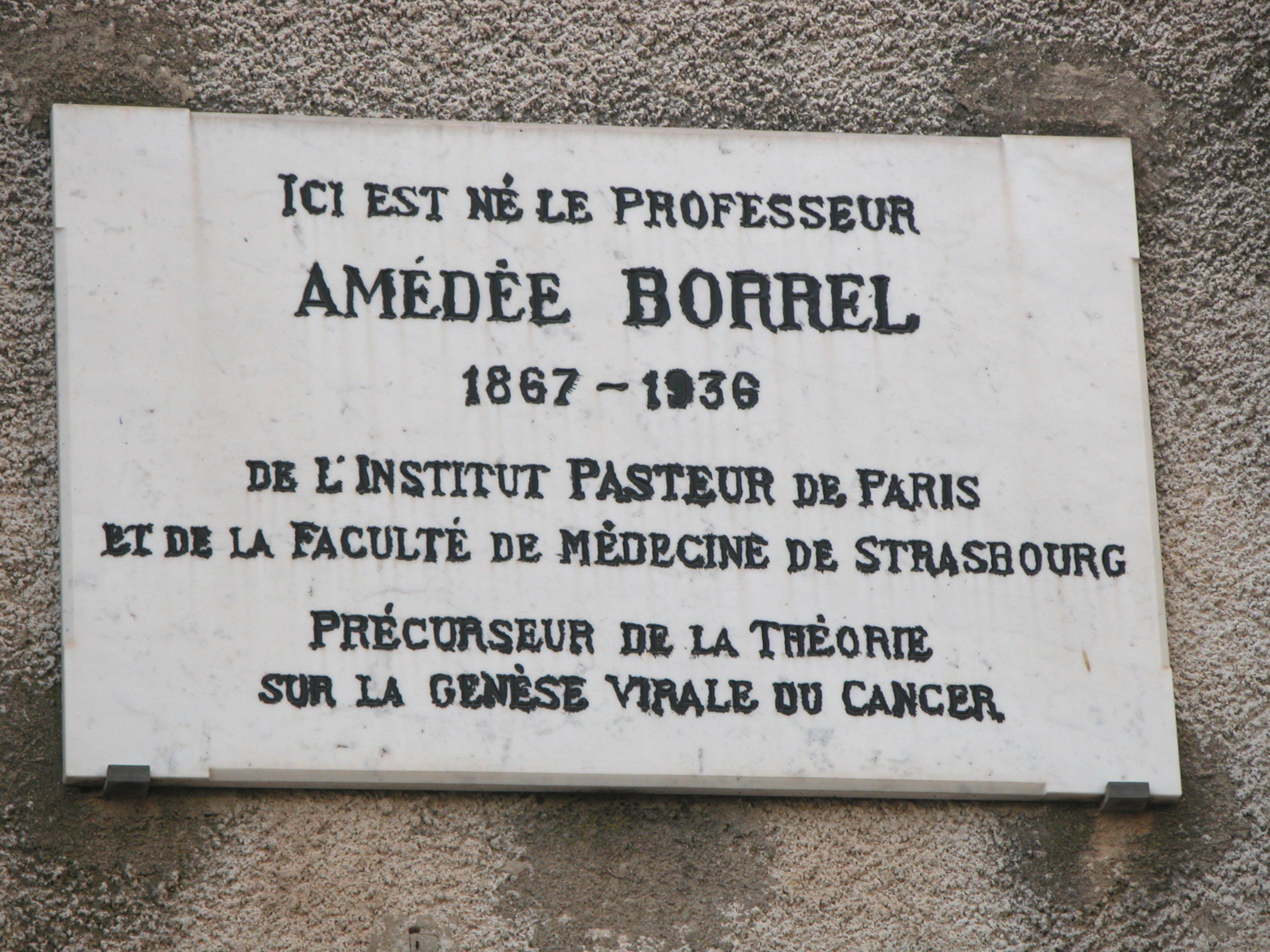 Plaque apposée sur la maison natale d'Amédée Borrel à Cazouls-lès-Béziers. Photo personnelle prise à Cazouls lès Béziers par mes soins.